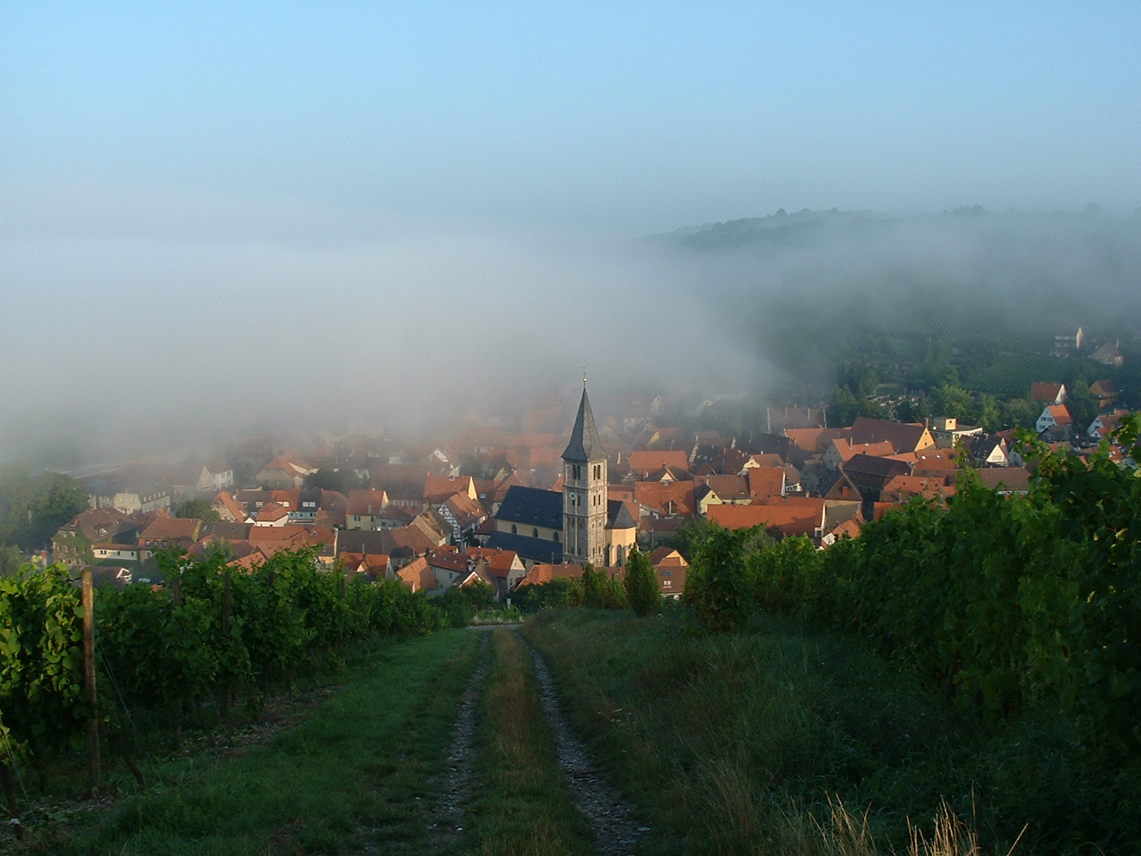 Randersacker im Nebel.